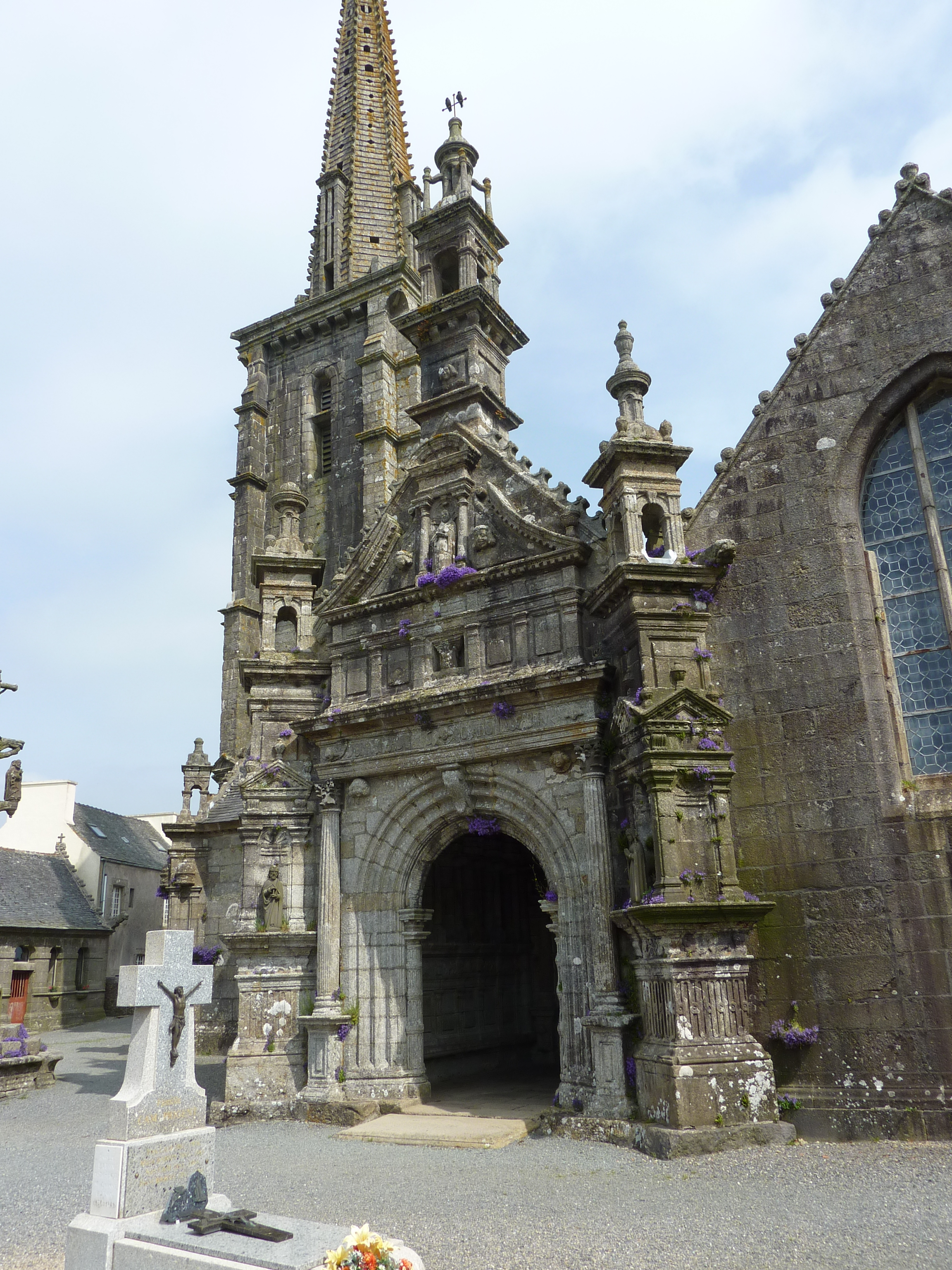 Commana Eglise Saint-Derrien Le porche sud et le clocher